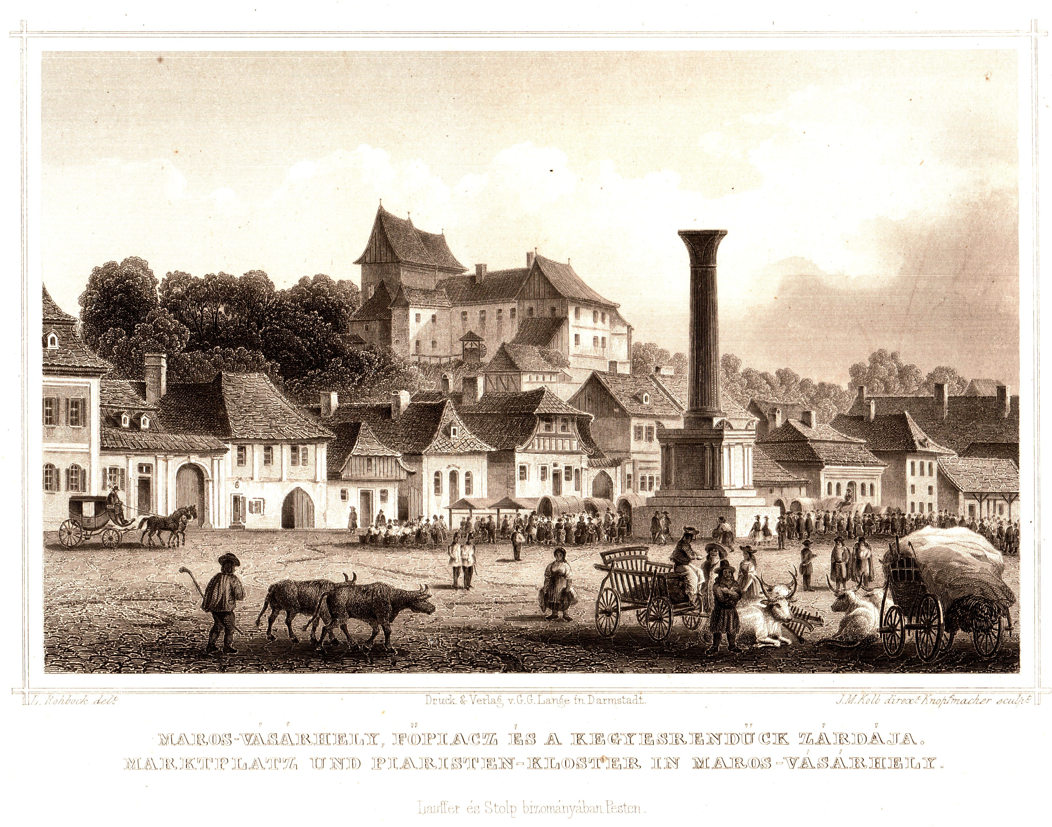 Maros-vásárhely, Főpiacz és a Kegyesrendűek Zárdája. A rézkarcot - melynek jelzete: L. Rohbock delt, Druck und Verlag v. G.G. Lange in Darmstadt, Lauffer és Stolp bizományában Pesten - 2012. szeptember 29 -én szkenneltem. ©© Published under Creative Commons in the METAPOLISZ DVD line (from Metapolisz CD ISBN 963-229-987-6 to Metapolisz 260 DVD ISBN 978-615-5011-14-6 and from that on without an ISBN number) ©© Megjelent Creative Commons alatt a METAPOLISZ sorozatban (Metapolisz CD ISBN: 963-229-987-6 -tól – Metapolisz 260 DVD ISBN 978-615-5011-14-6 -ig számozott, majd ISBN számozás nélküli sorozat). Published under Creative Commons in the Metapolisz DVD line. All of the photos and vids in the Metapolisz DVD line are under Creative Commons and can be used even for commercial – for profit – purposes. Recommended Citation Derzsi Elekes Andor: Metapolisz DVD line Megjelent Creative Commons alatt a Metapolisz sorozatban. A Metapolisz sorozat valamennyi képe és filmje Creative Commons alatti valamint kereskedelmi - for profit - célra is felhasználható. Ajánlott hivatkozás: Derzsi Elekes Andor: Metapolisz DVD line